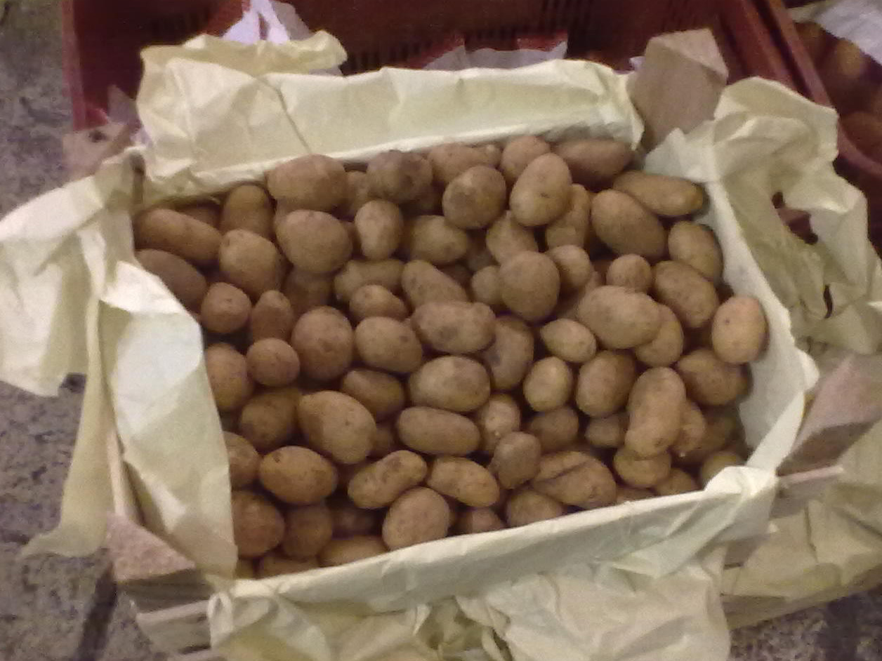 Patata sieglinde di galatina alla fiera del gusto di Maglie